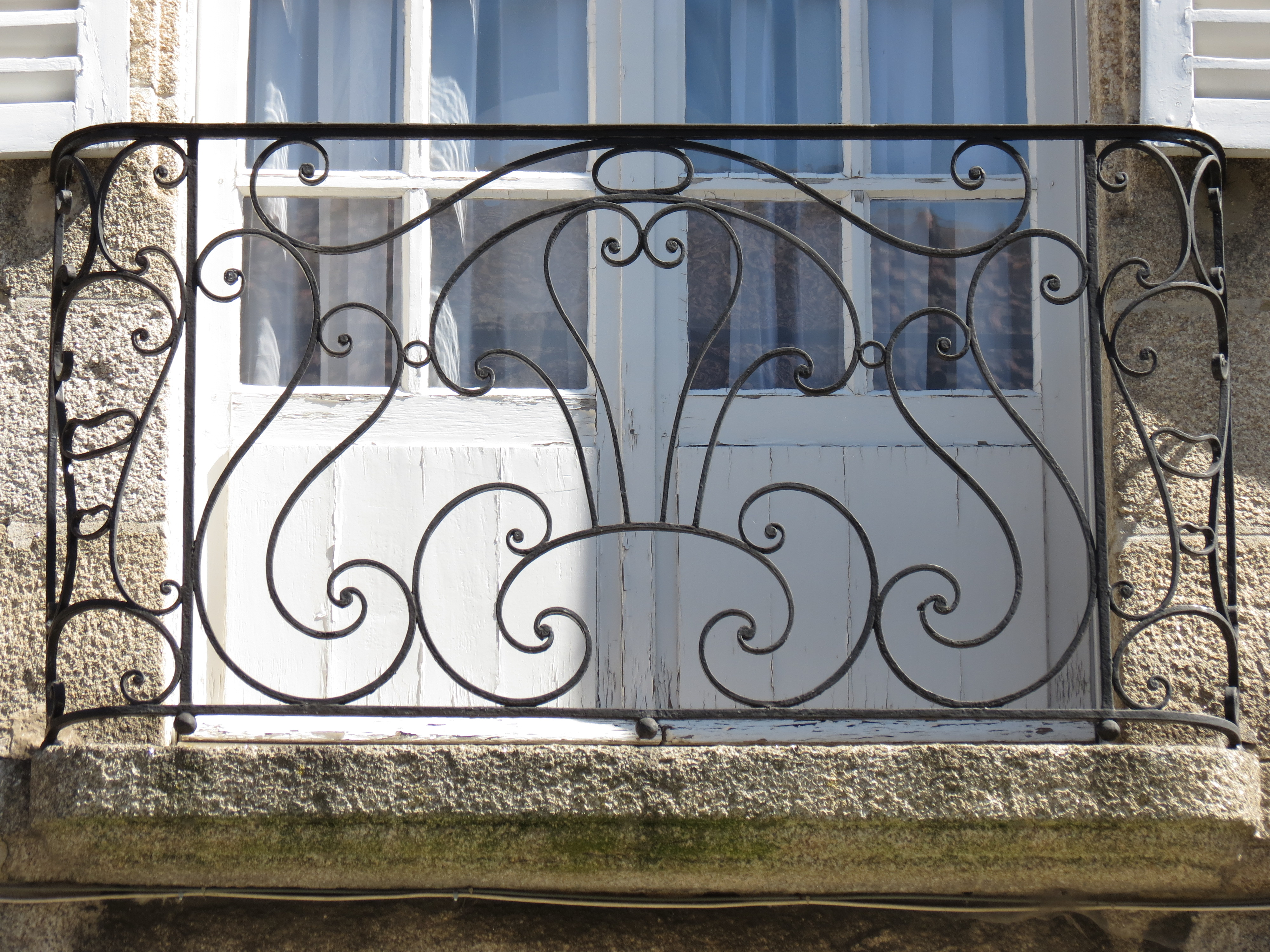 Maison, 12 rue des Marcheries, Alençon, Orne, Normandie.